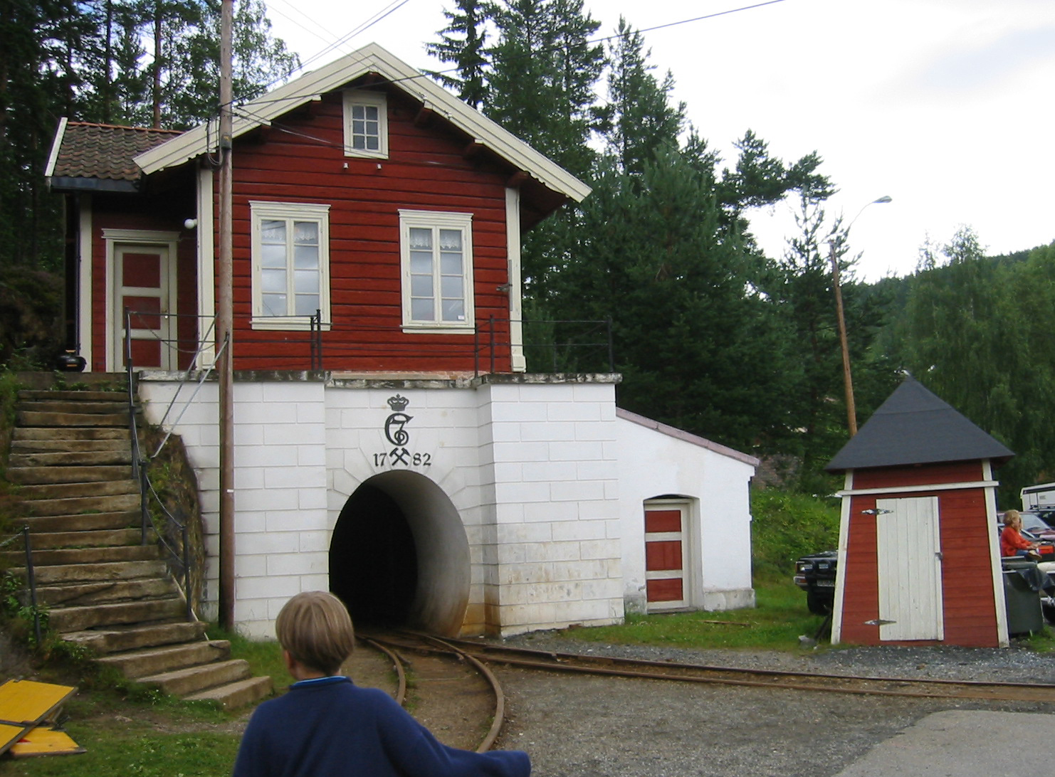 Kongens gruve, Kongsberg (Entrance to Kongsberg Silver Mine)